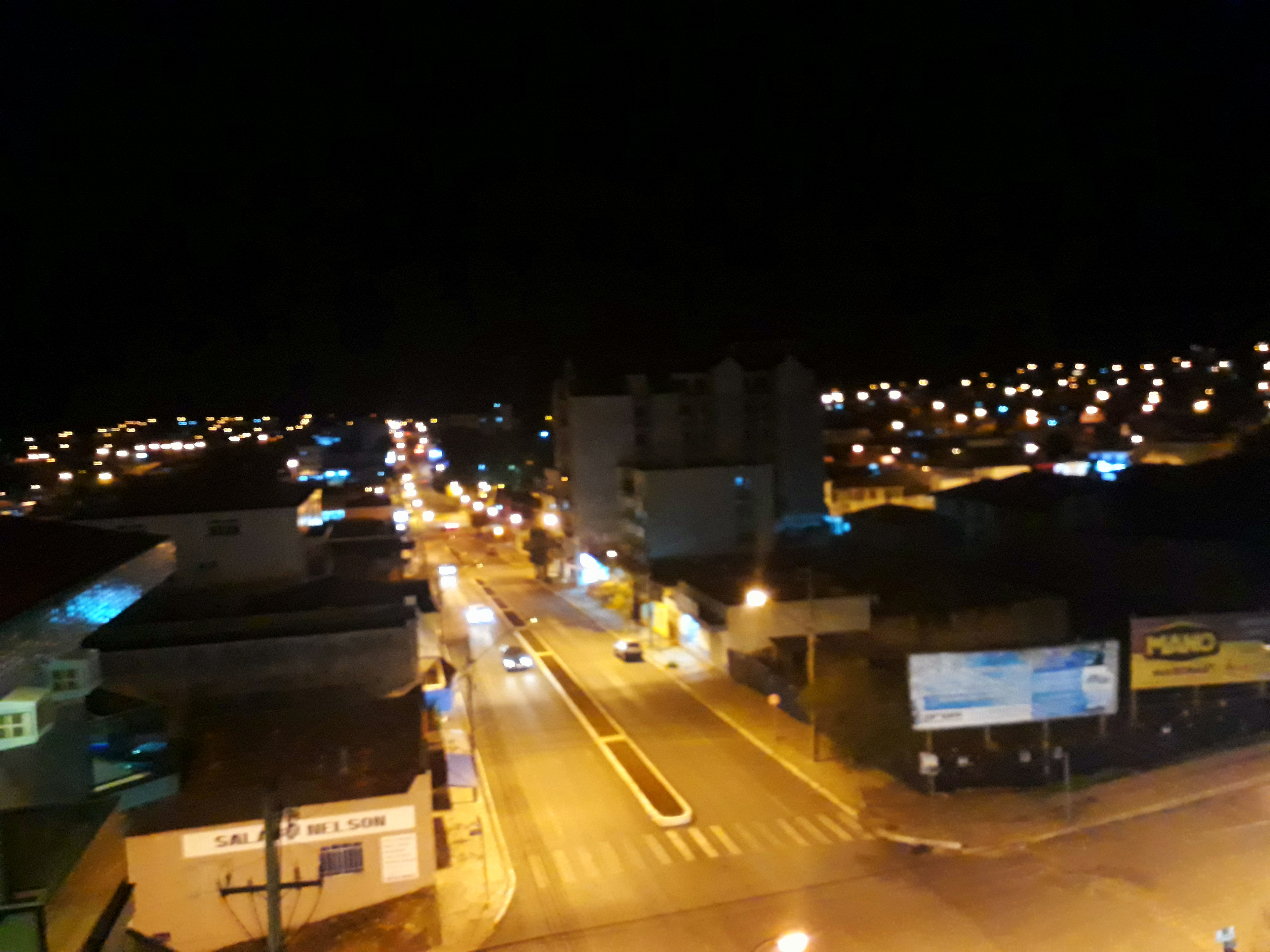 Vista noturna do centro da cidade de São Mateus do Sul, no Paraná.